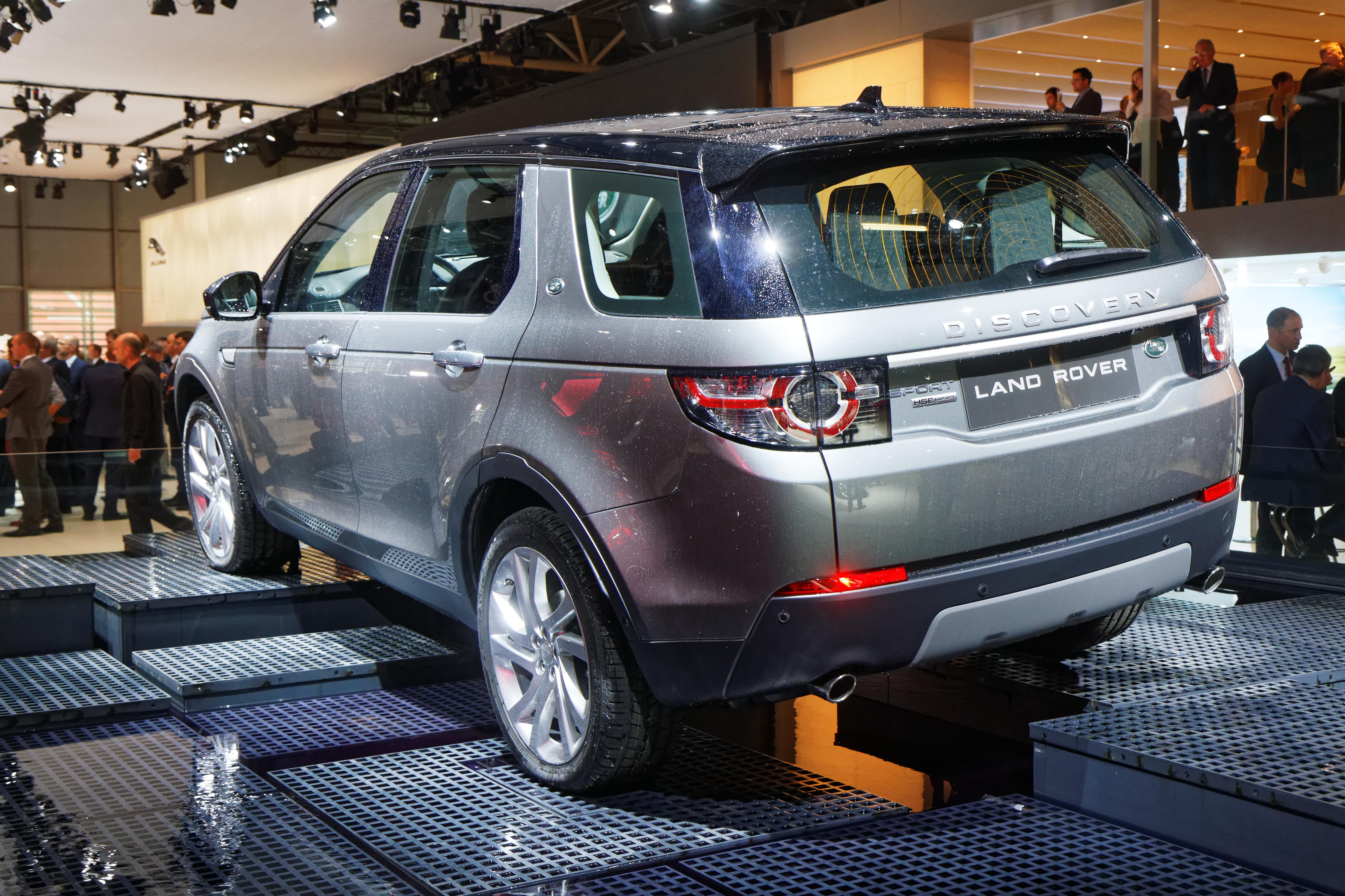 Une Land Rover Discovery présentée lors du mondial de l'automobile de Paris 2014.